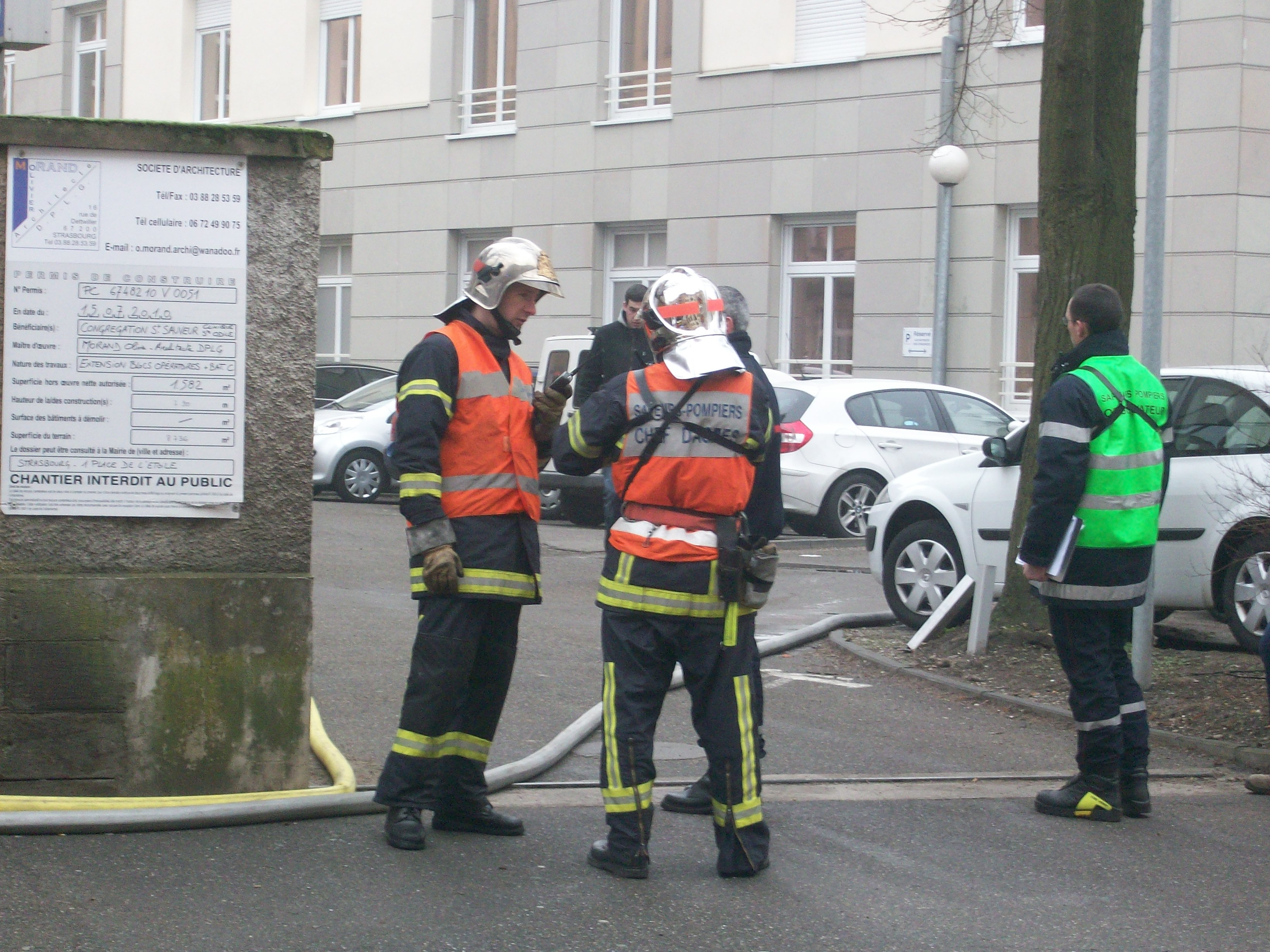 Sapeurs-pompiers en exercice à Strasbourg - février 2011